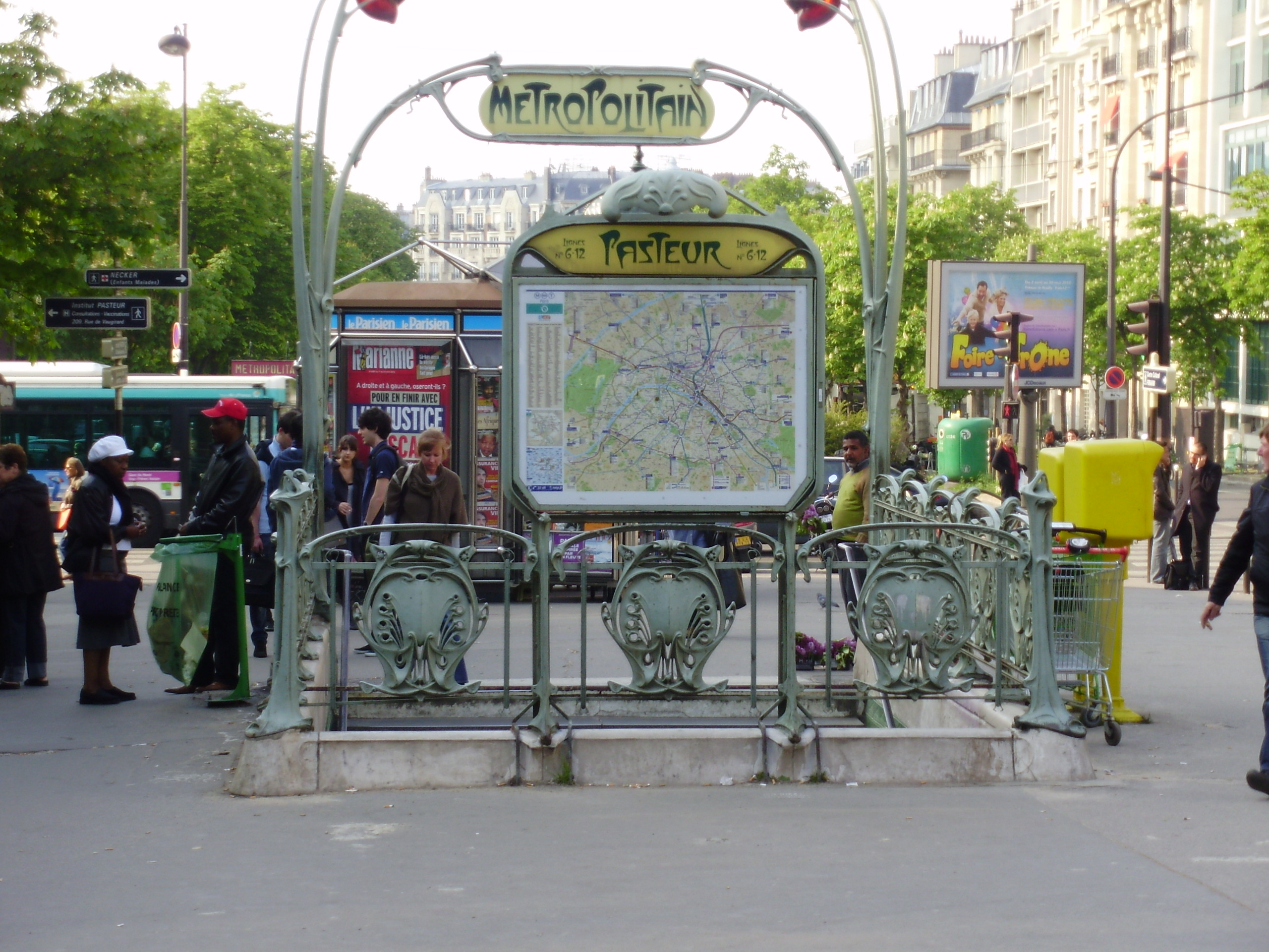 Entrée de la station Pasteur (côté ligne 6) du métro de Paris